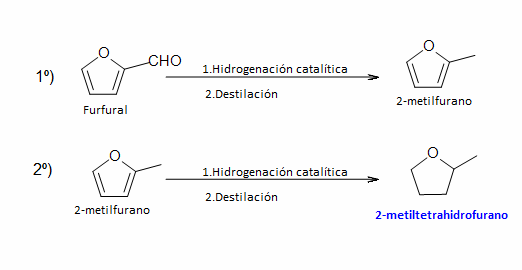 obtencion a partir de furural de 2-metiltetrahidrofurano